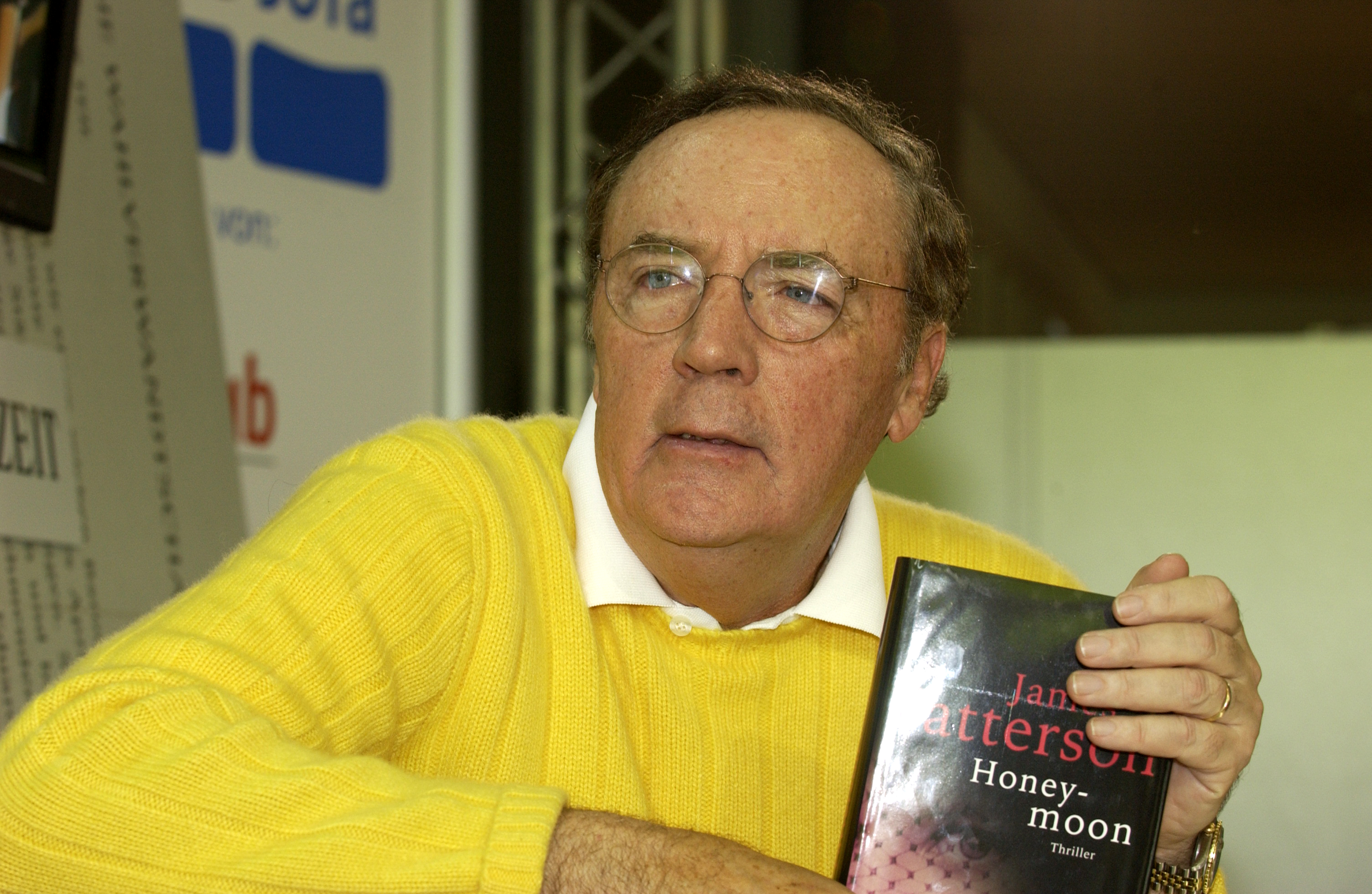 James Patterson im Gespräch mit Christhard Läpple.